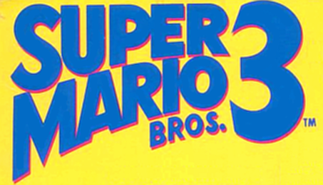 Logo des Videospiels Super Mario Bros. 3